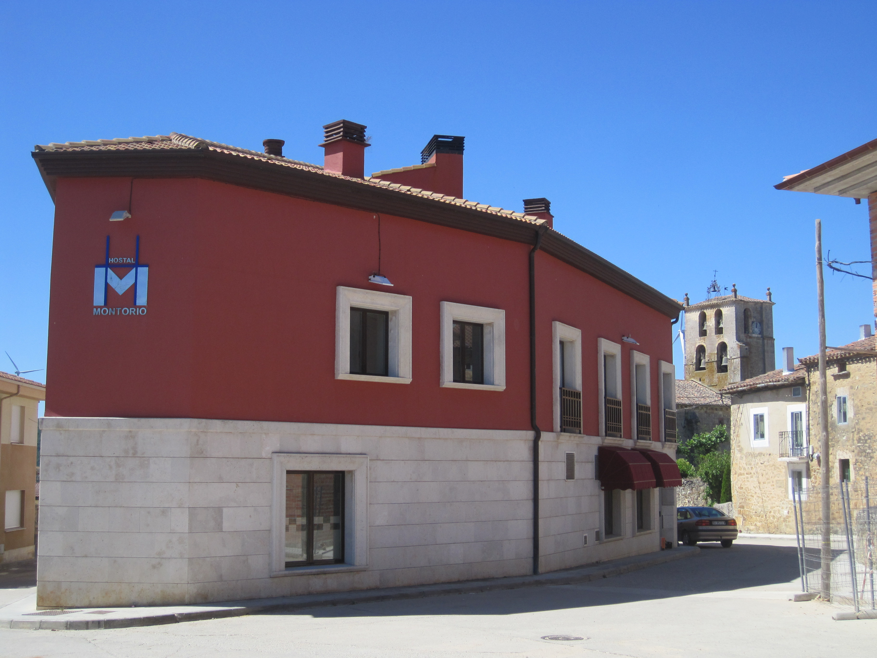 Vista frontal de uno de los establecimientos de restauración y hostelería del municipio